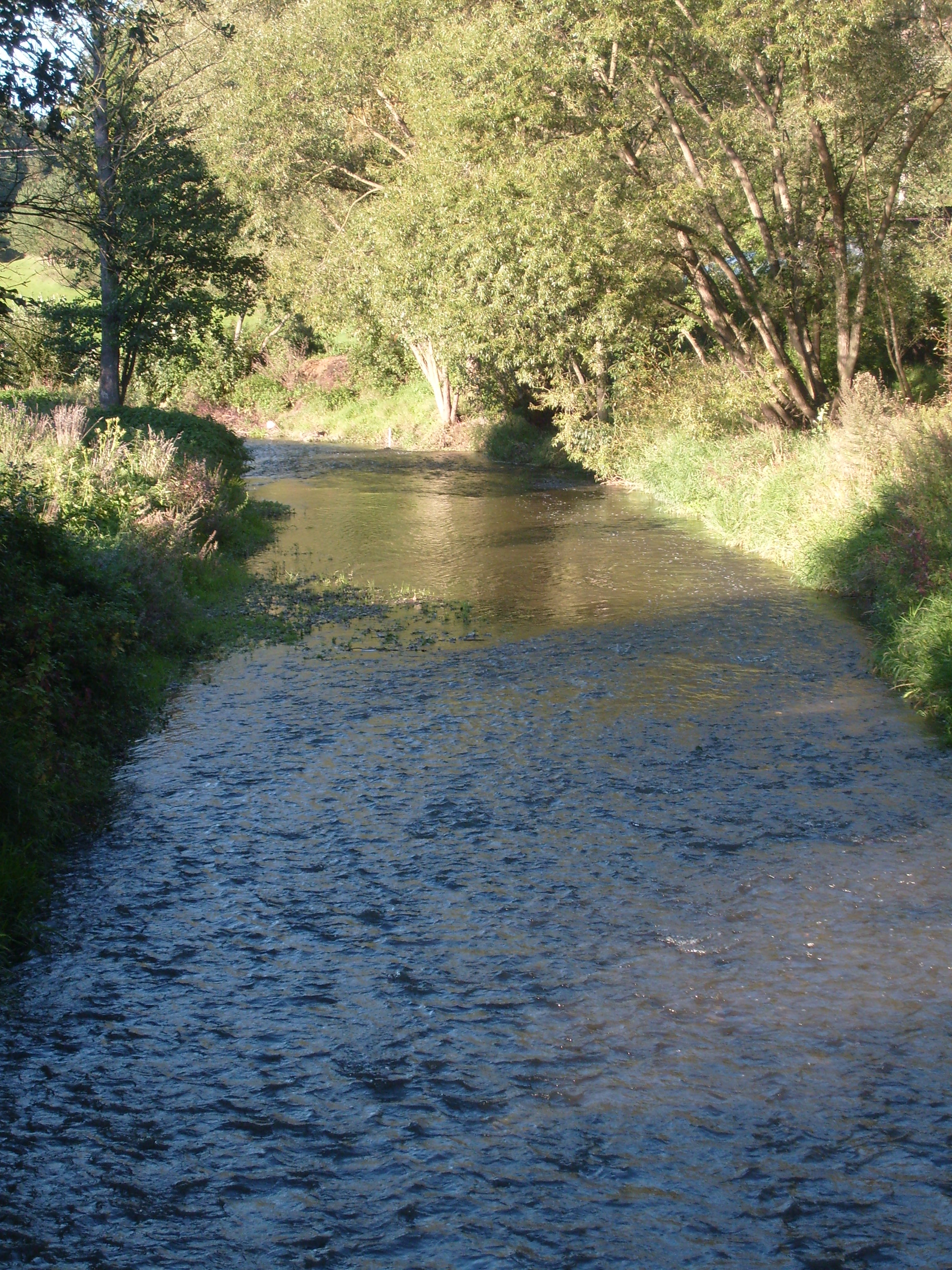 Potok Mastník Na Chalupách v Sedlčanech.